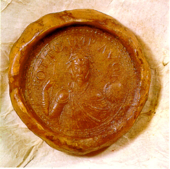 Otto I., sogen. 3. Kaisersiegel, Magdeburg, Landeshauptarchiv Sachsen-Anhalt, Rep. U 1, Tit. I. Nr. 23: 966 August 24, aus: Bernward 2, II-2, S. 18f. (R. Kahsnitz).